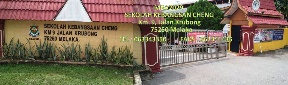 Sekolah Kebangsaan Cheng, Melaka